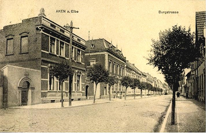 Burgstraße in Aken (Elbe) um 1910